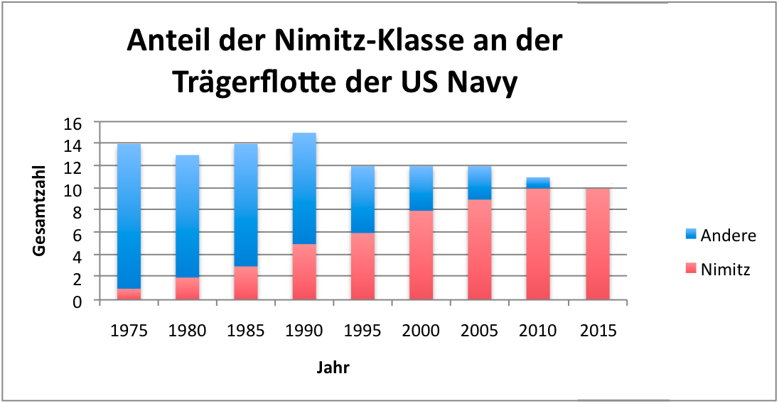 Anteil der Flugzeugträger der Nimitz-Klasse an der Trägerflotte der US Navy